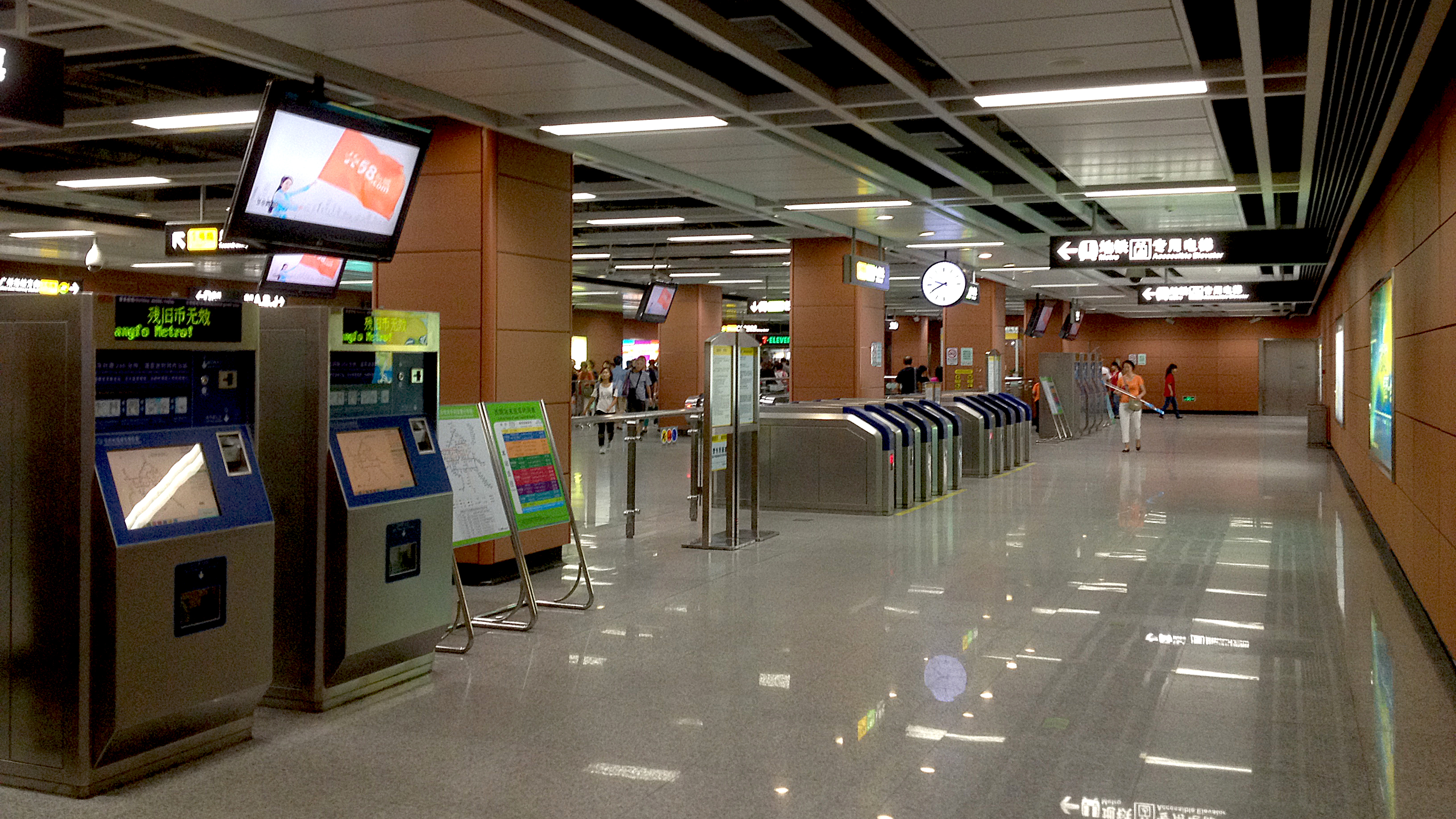 广州地铁西朗站广佛线站厅